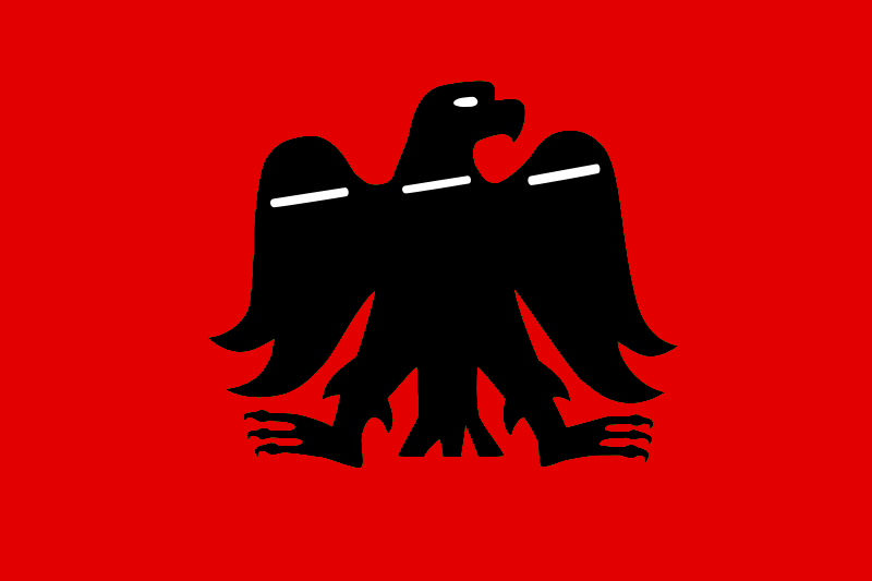 Bandera del Reino de Pamplona en proporcion de bandera normalizada